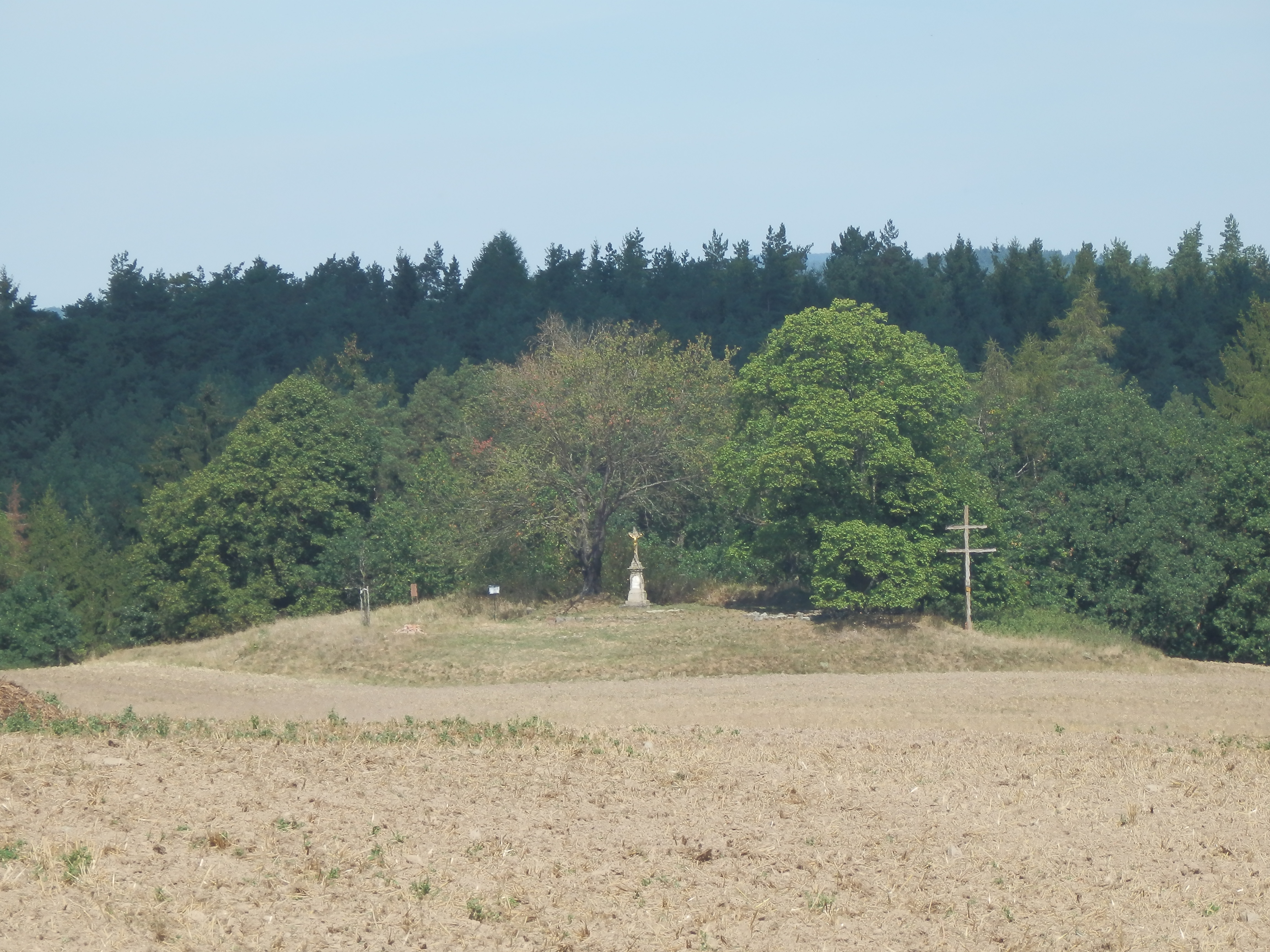 Kostel sv. Klimenta, zřícenina (Lipůvka), Lipůvka